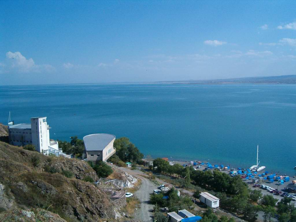 Lake Sevan